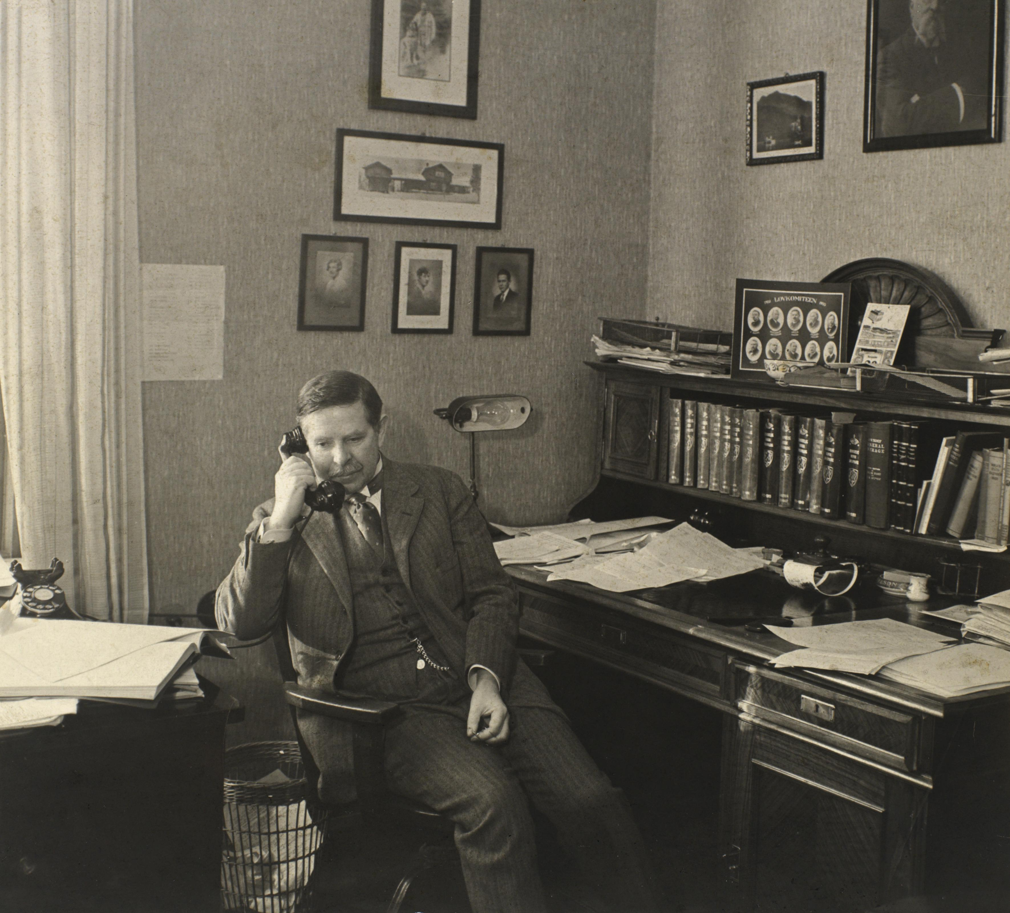 Henrik Ameln (1879–1961), dispasjør, overrettssakfører, ordfører og stortingsmann (H) fra Bergen.